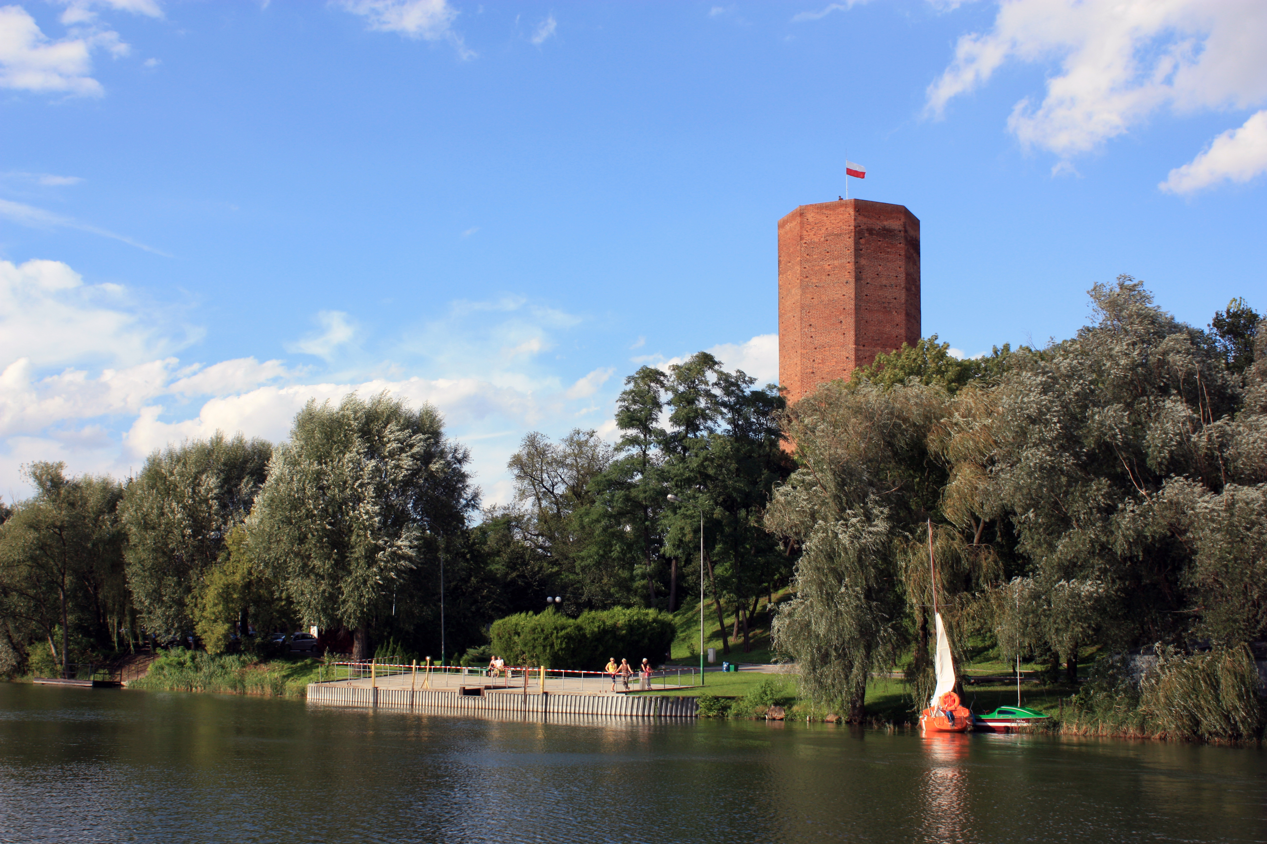 ruiny zamku, tzw. Mysia Wieża, poł. XIV w. Kruszwica